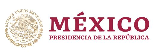 Logotipo usado por la oficina de la Presidencia de México para el periodo 2018-2024